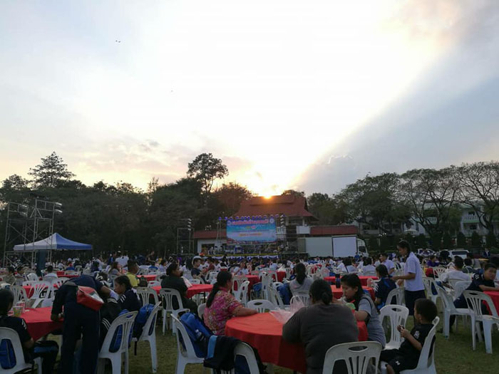 งานสายสัมพันธ์วันครอบครัว ครั้งที่ 12 โรงเรียนสันป่าตองวิทยาคม